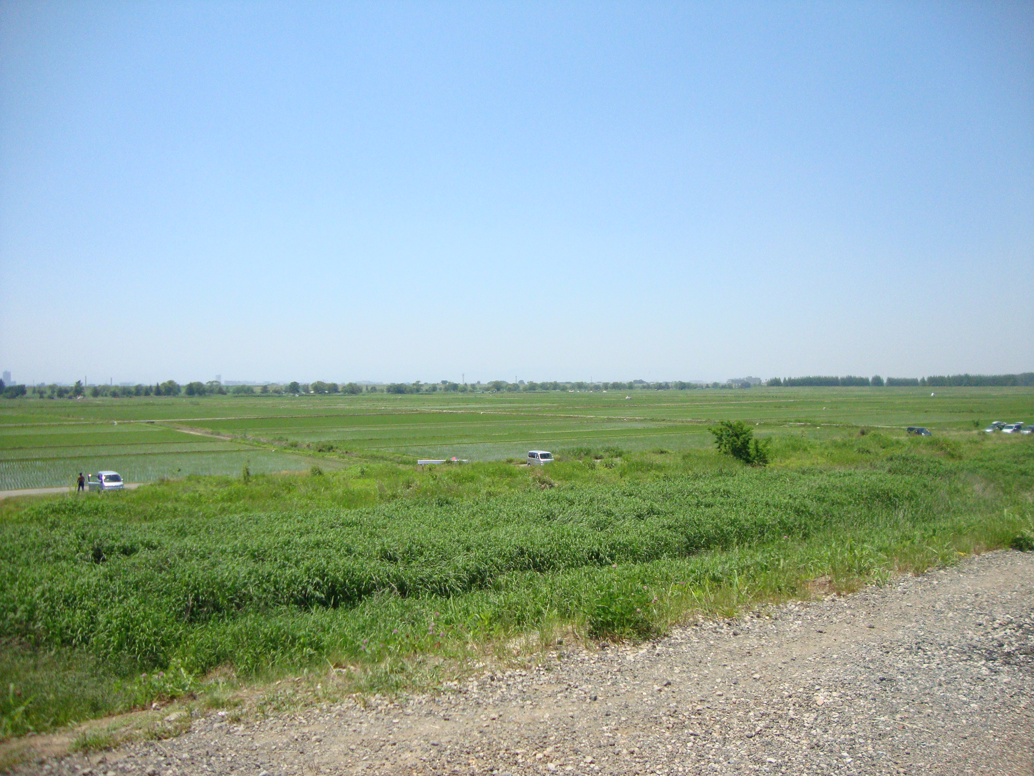 荒川左岸の河川敷。さいたま市桜区・西区境界付近の堤内側堤防上より撮影。座標は目安です。